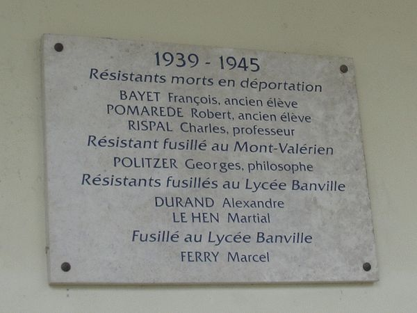 Nom